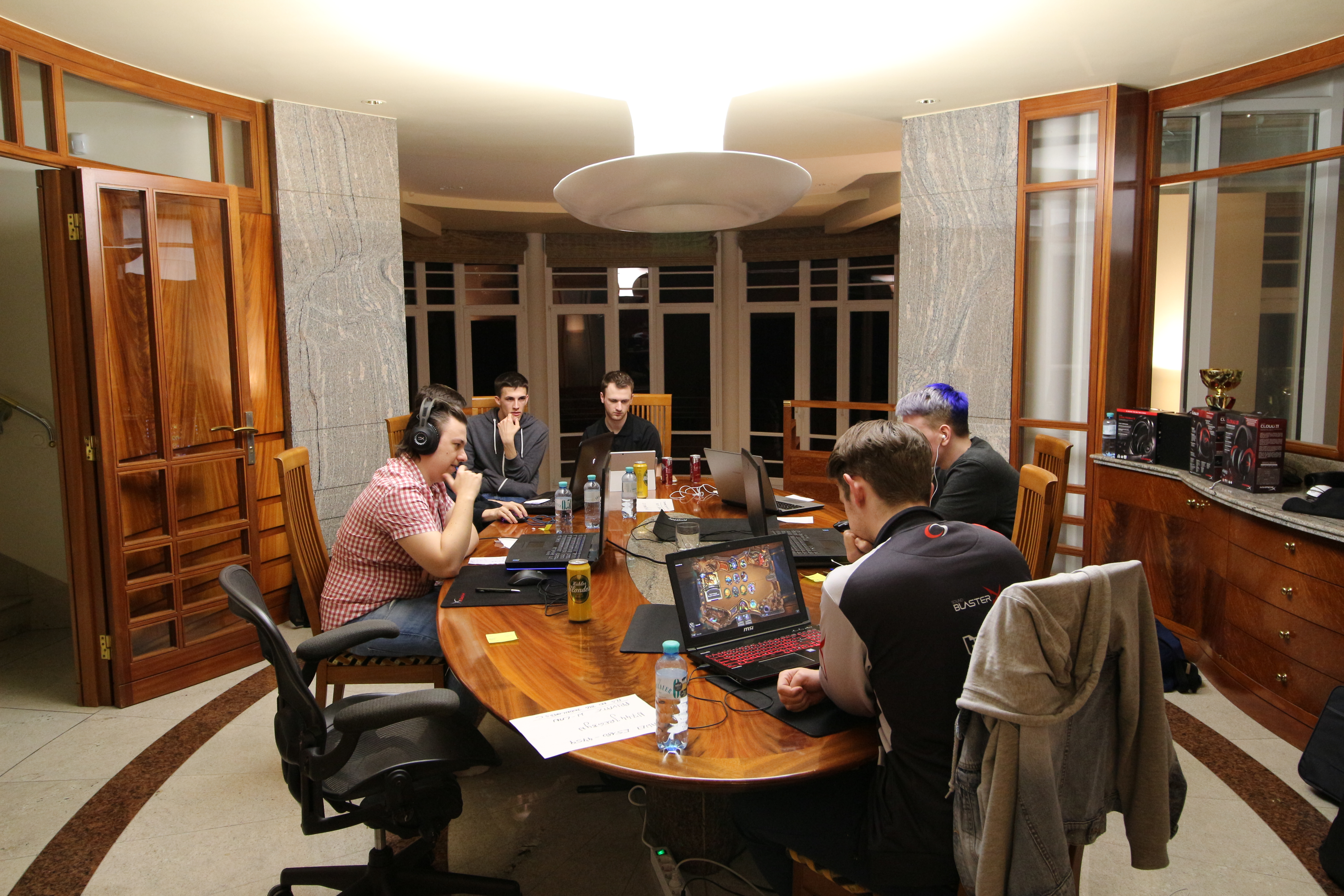 E-Sports-Turnier "Throne of Cards IV" im April 2017 in Wien. Blick auf die Player Area. Die letzten Spiele der Gruppenphase werden entschieden und Pros spielen gegen Newcomer.